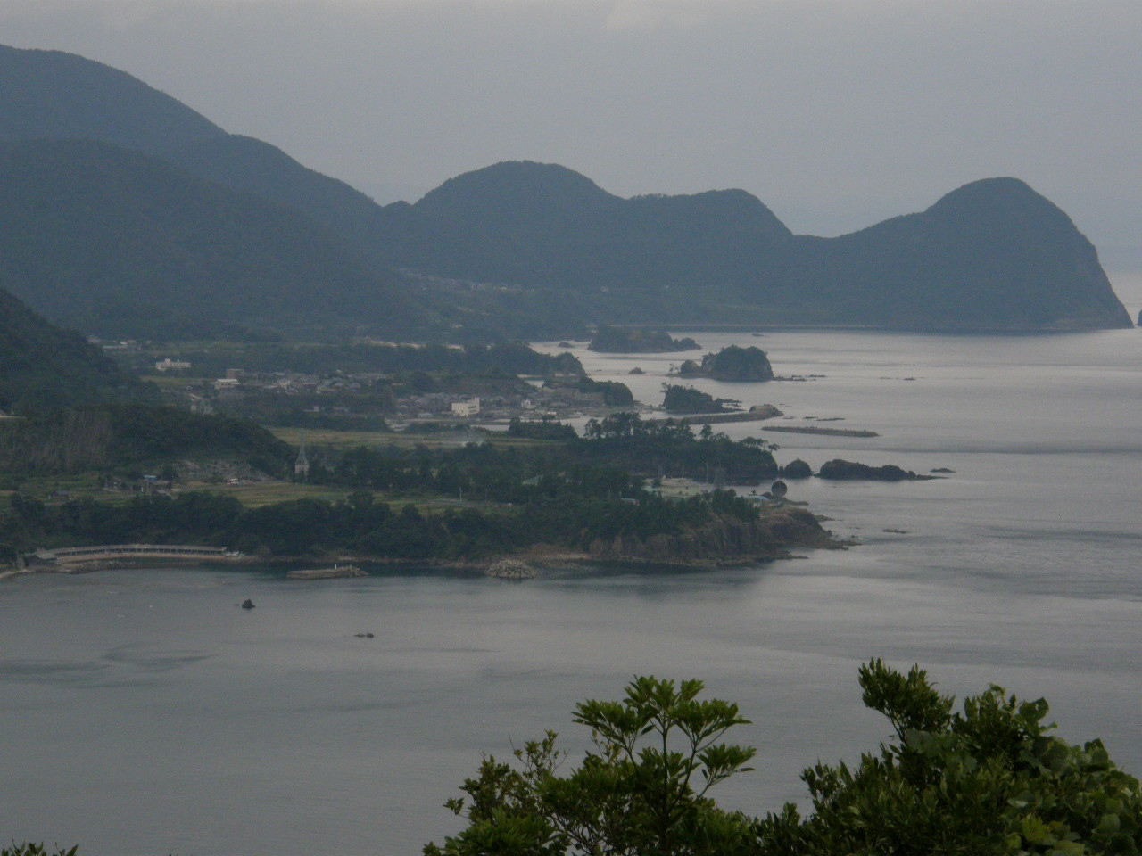 Tango-Matsushima,Tango peninsula 丹後松島 京丹後市丹後町平